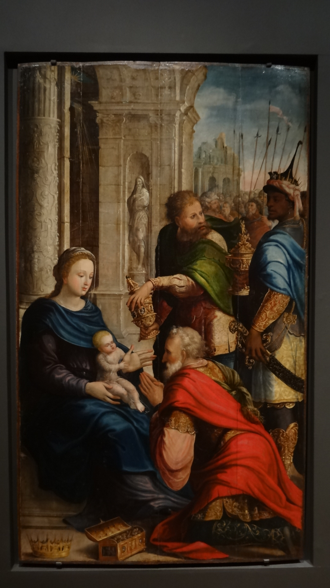 Adoração dos Magos é uma pintura a óleo de c. 1550-60 pintado por oficina portuguesa para o Retábulo da Matriz de Santa Cruz, na ilha da Madeira.